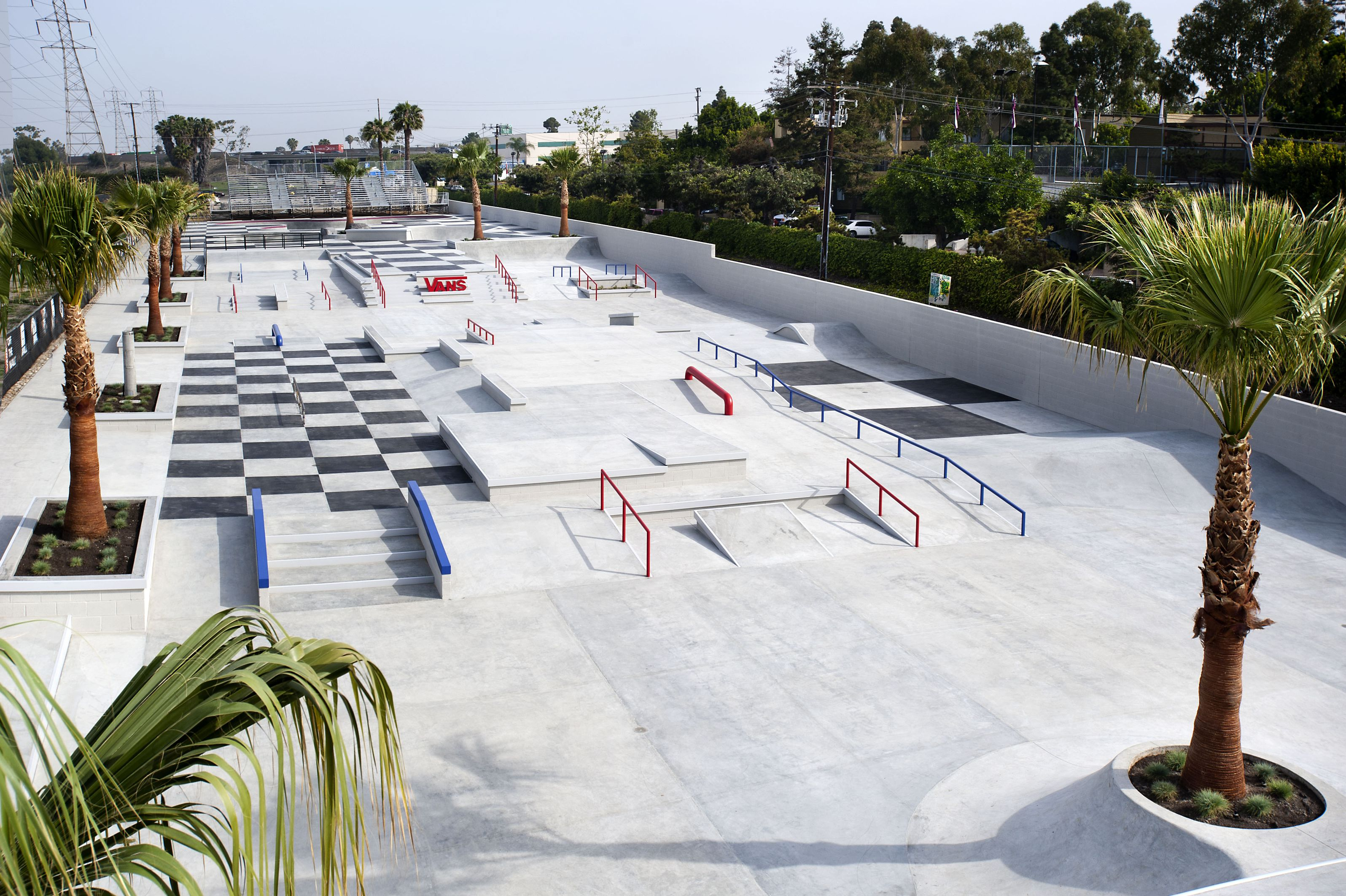 Foto de un skatepark